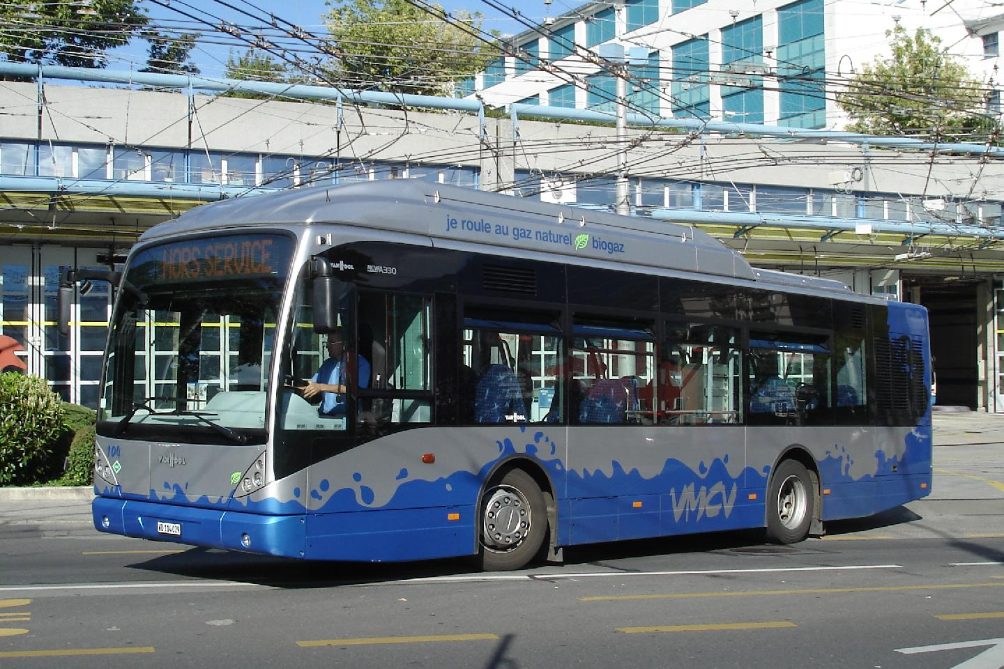 Van Hool A330 Autobus 104 der Vevey–Montreux–Chillon–Villeneuve bei der Haltestelle Dépôt VMCV in Clarens vor dem Trolleybus- und Autobusdepot zwischen Vevey und Montreux.